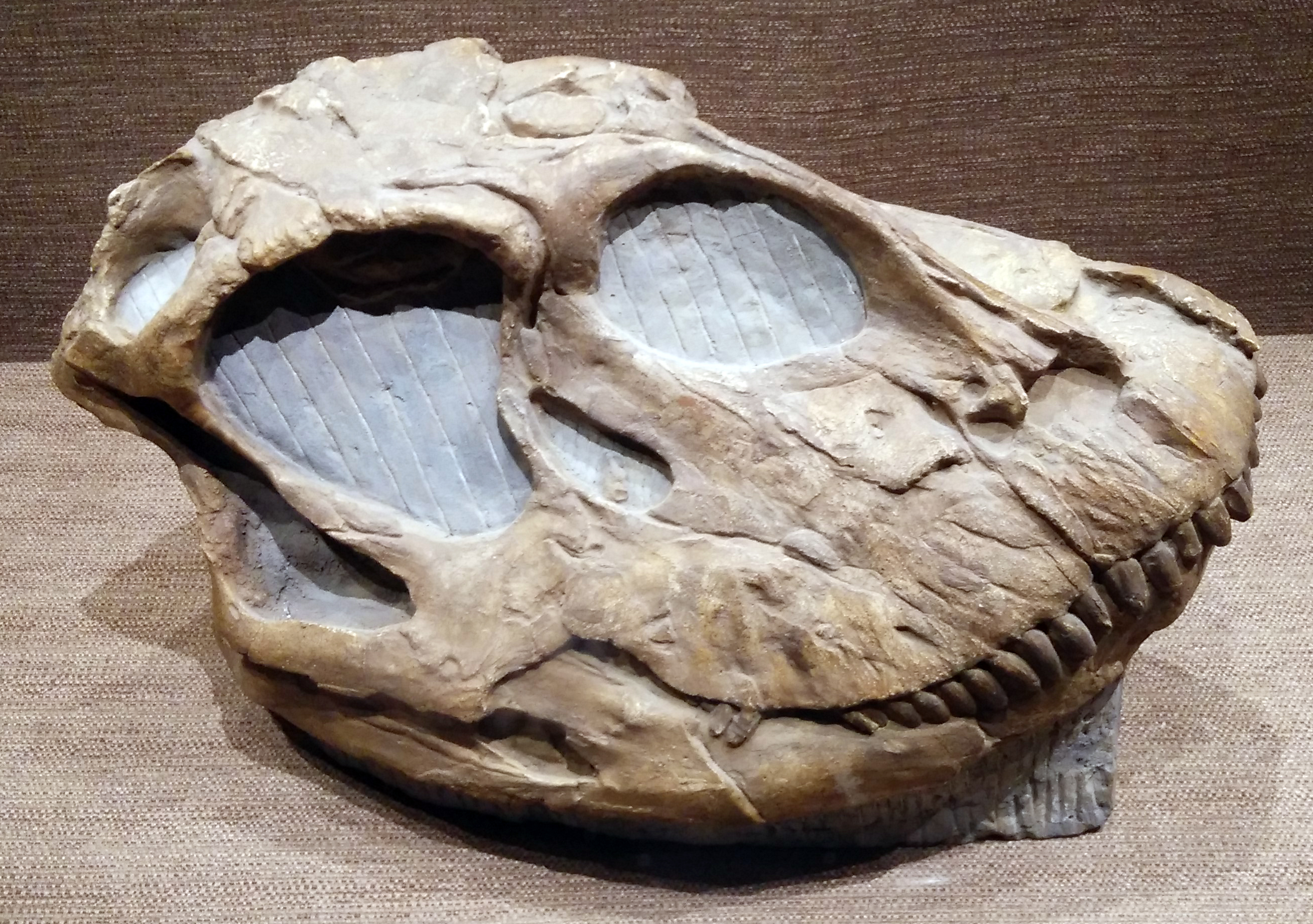 摄于自贡恐龙博物馆